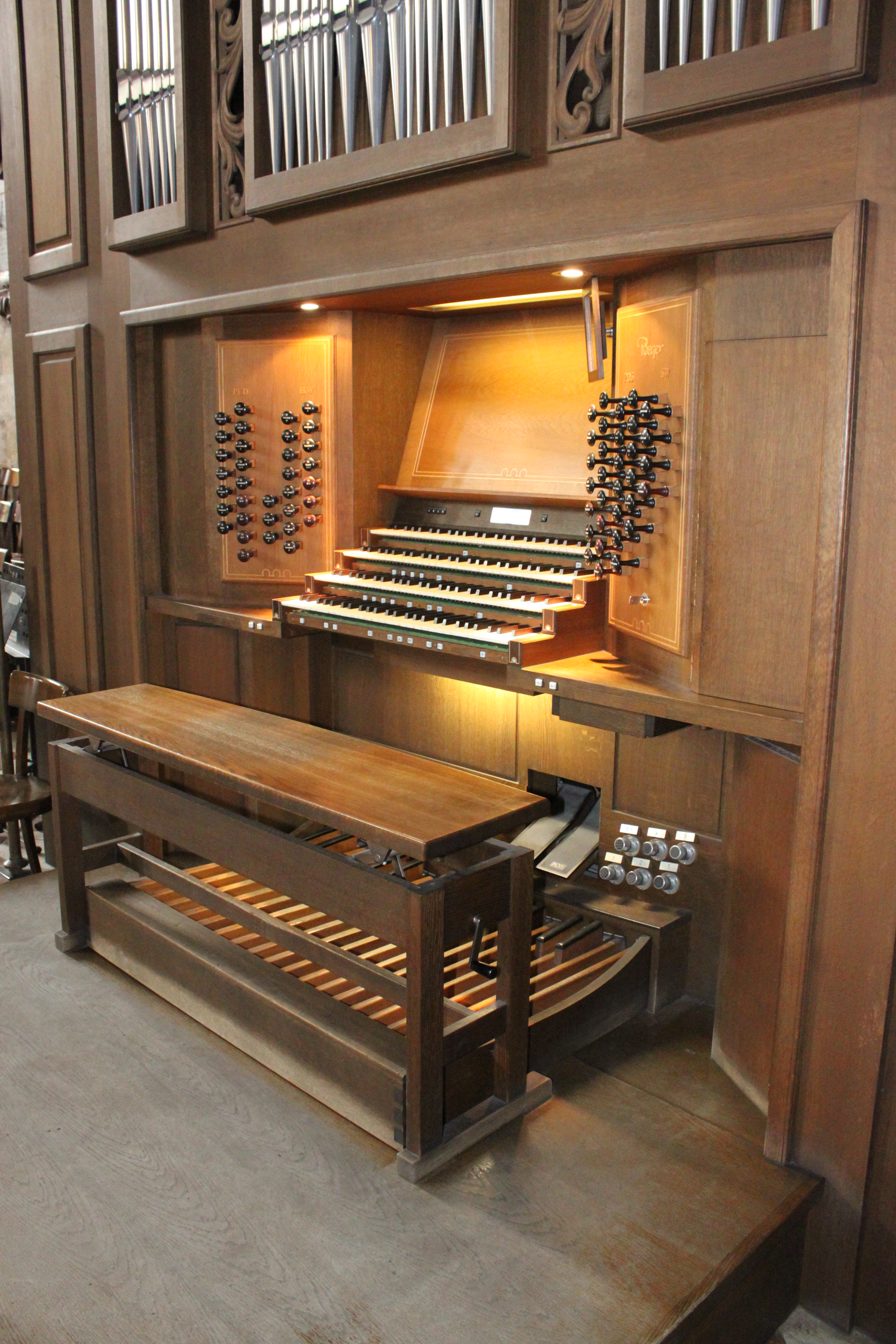 Spieltafel der Domorgel (errichtet 1991 von Rieger Orgelbau) des Wiener Stephansdoms